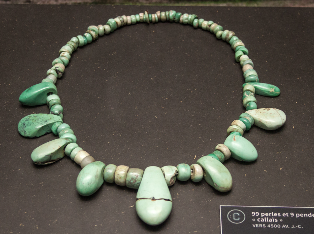 Callais_necklace,_99+9 pieces